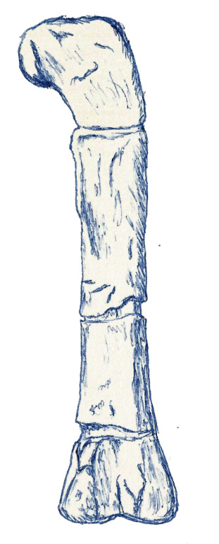 Illustration of a fossil of Erectopus